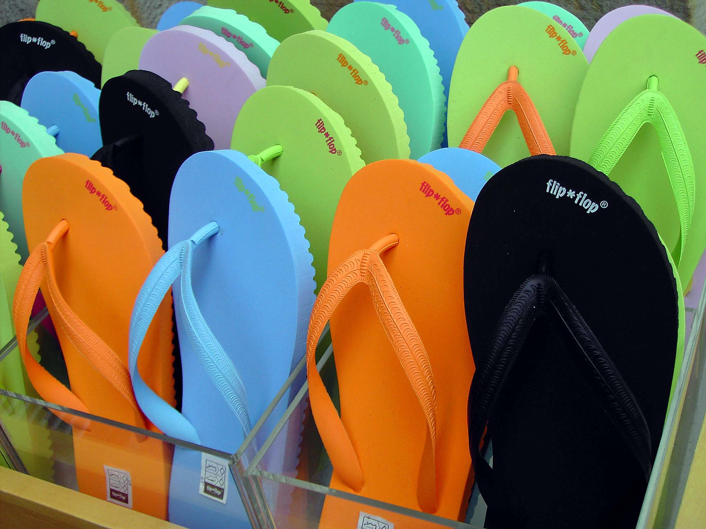 buntebunte FlipFlops in der Auslage eines Geschäftes in Hannover